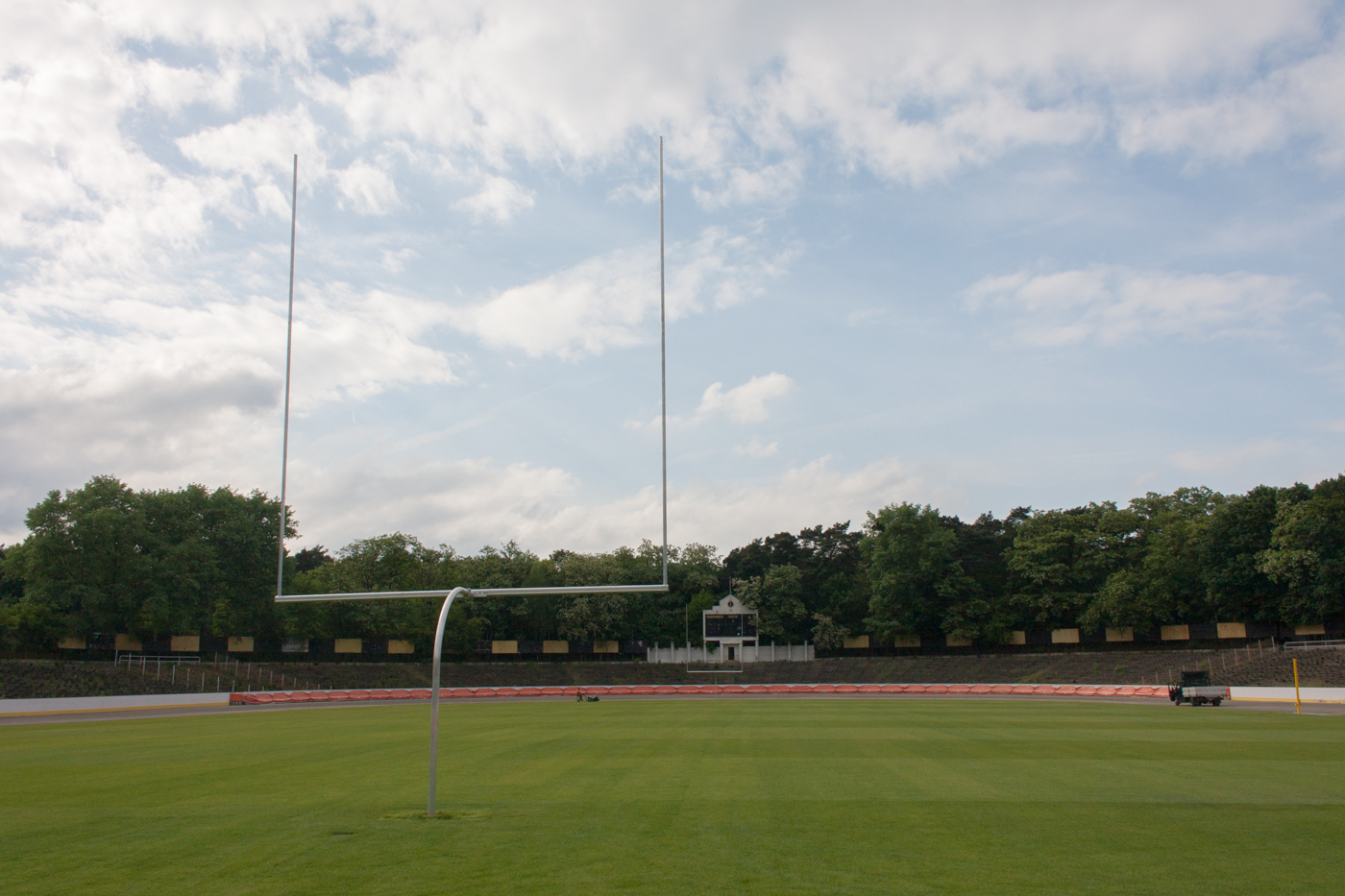 Gotowe boisko do futbolu amerykańskiego na poznańskim Golęcinie, zrealizowane w ramach Budżetu Obywatelskiego 2014.